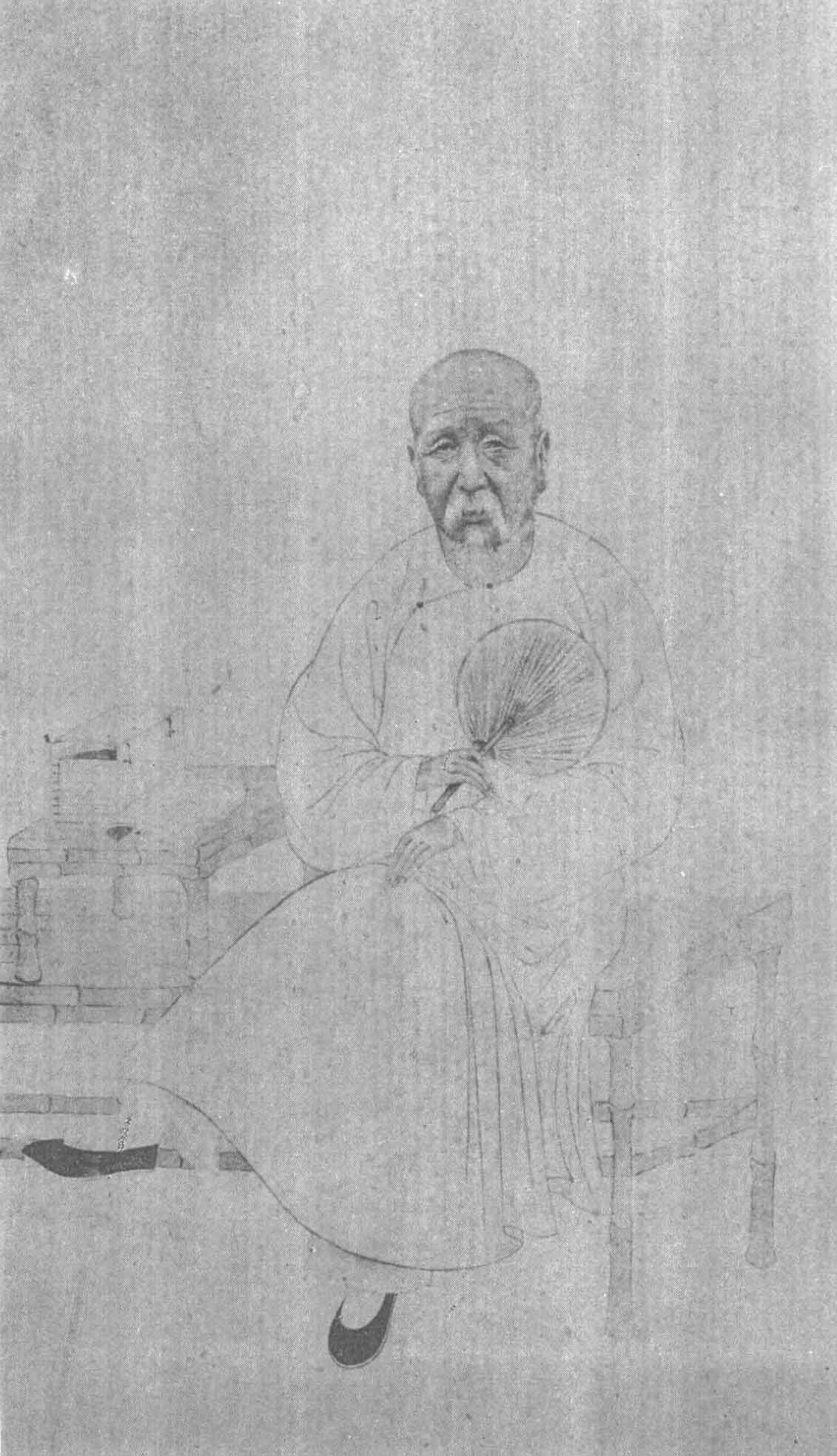 譚瑩，清代學者。Tan Ying